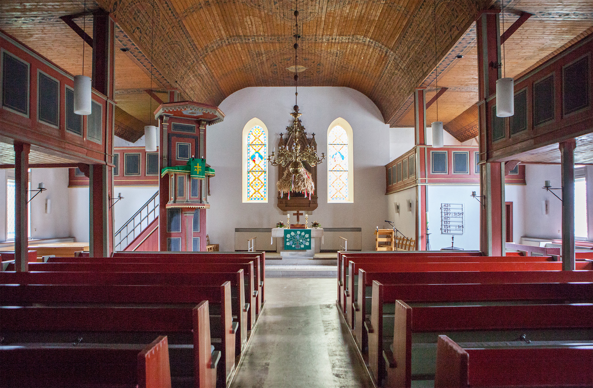 Evangelische Kirche Bergkirchen, InnenraumThis is a photograph of an architectural monument.